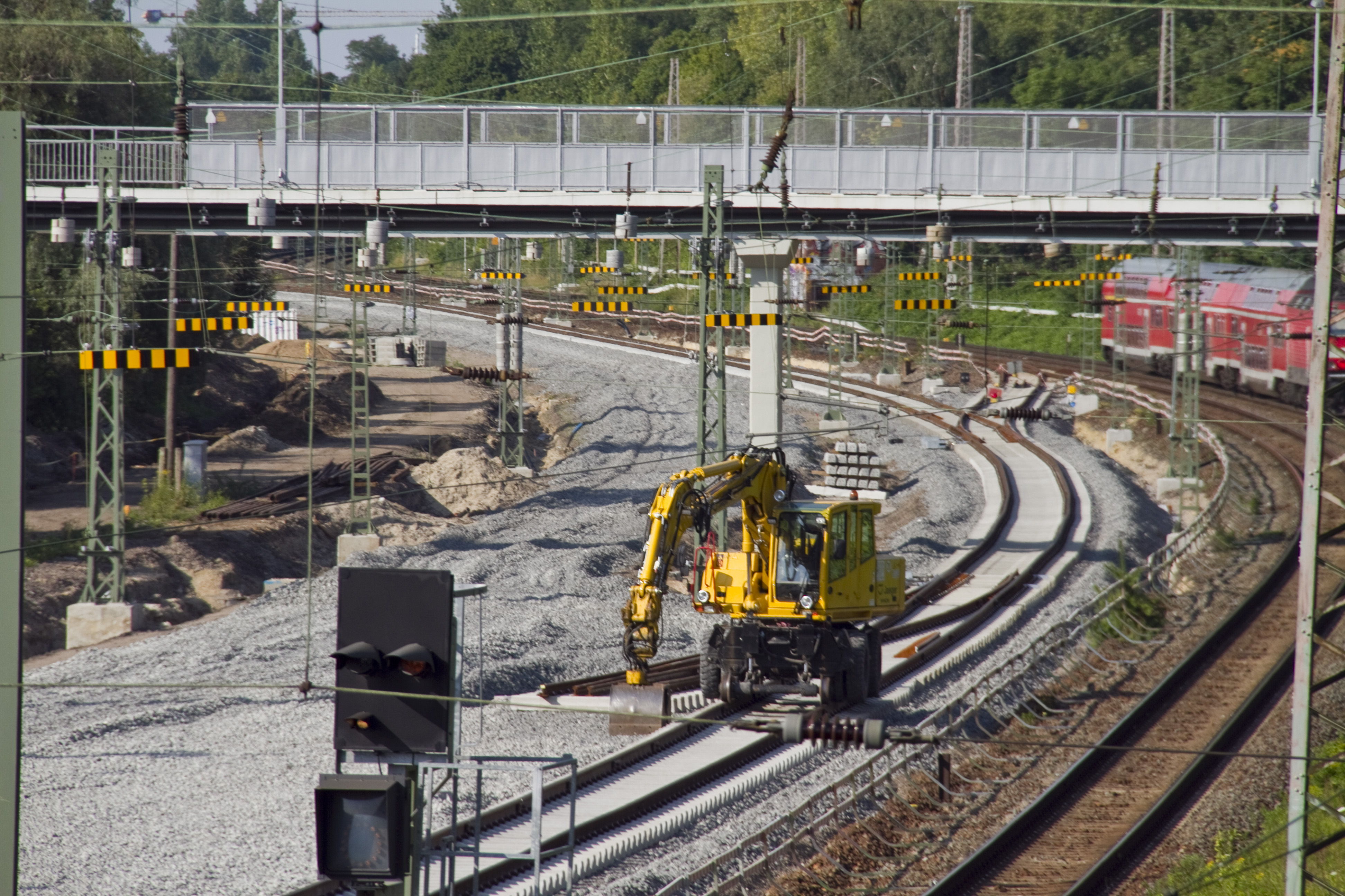 Umbau der Gleisanlagen im Bahnhof Connewitz im Rahmen der Netzergänzenden Maßnahmen